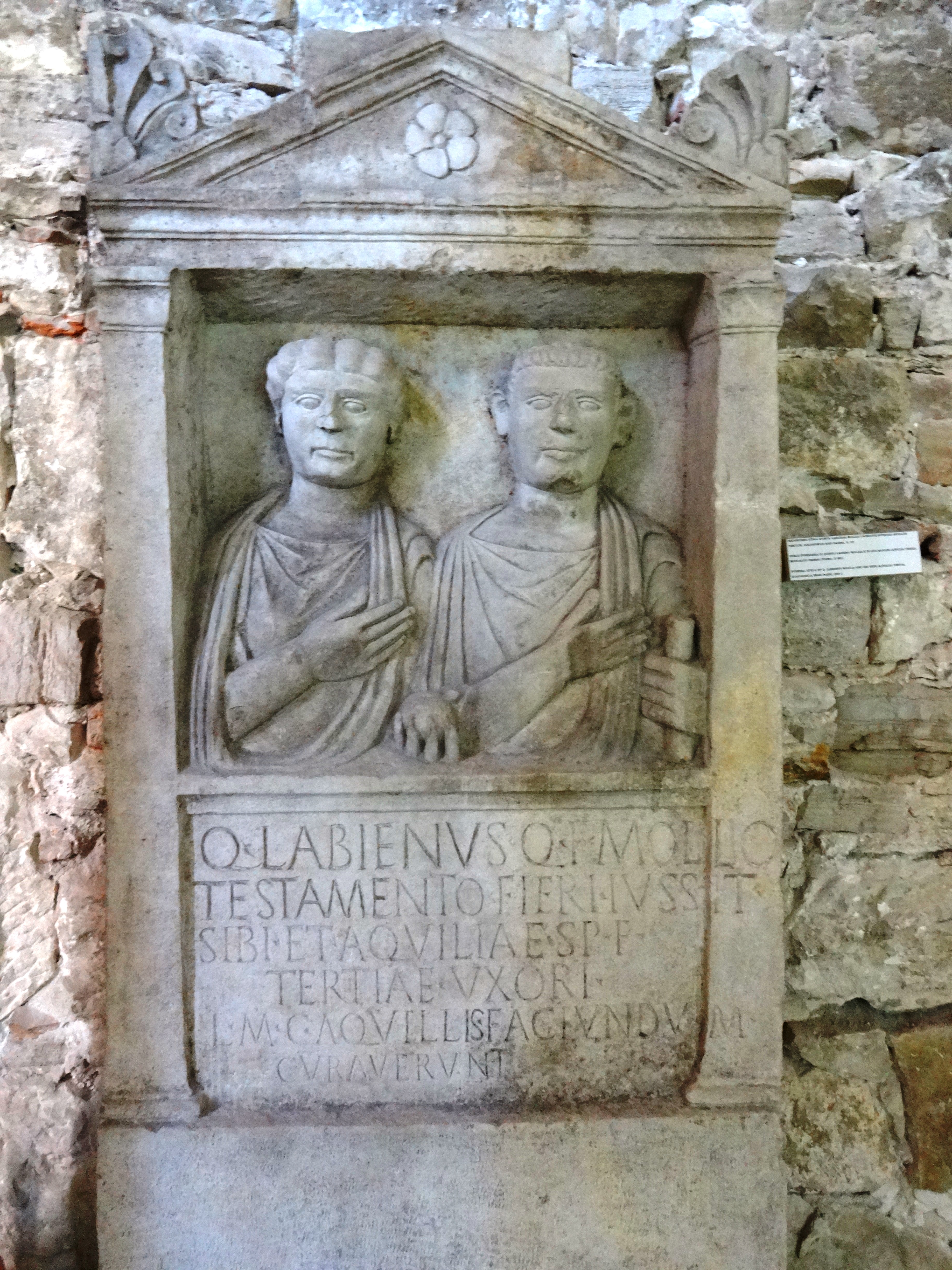 Grabstele für Q. Labienus Mollio und seiner Frau Aquillia Tertia, Augustustempel, Pula